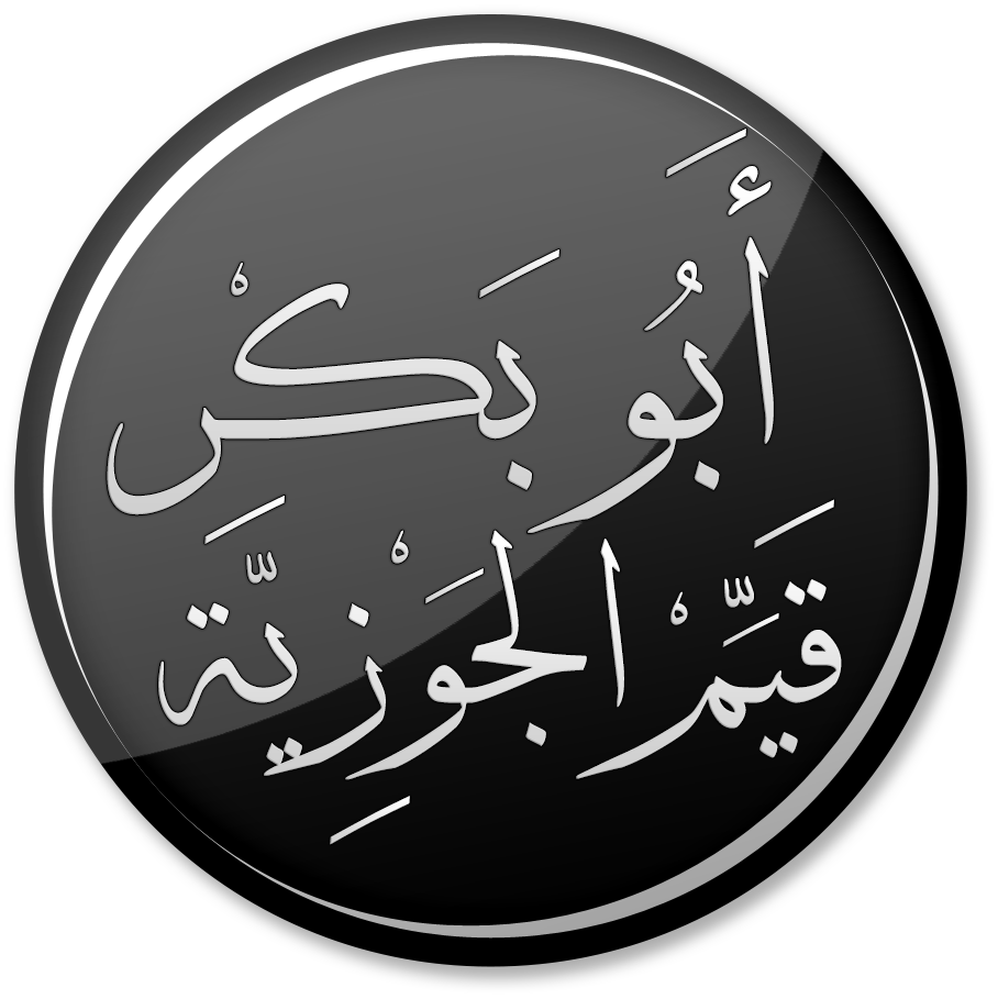 أبو بكر بن أيوب بن سعد الزرعي الدمشقي الحنبلي، والد الإمام ابن القيم